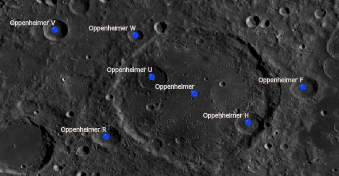 Cráter lunar Oppenheimer. Cráteres satélite. (Imagen LRO)